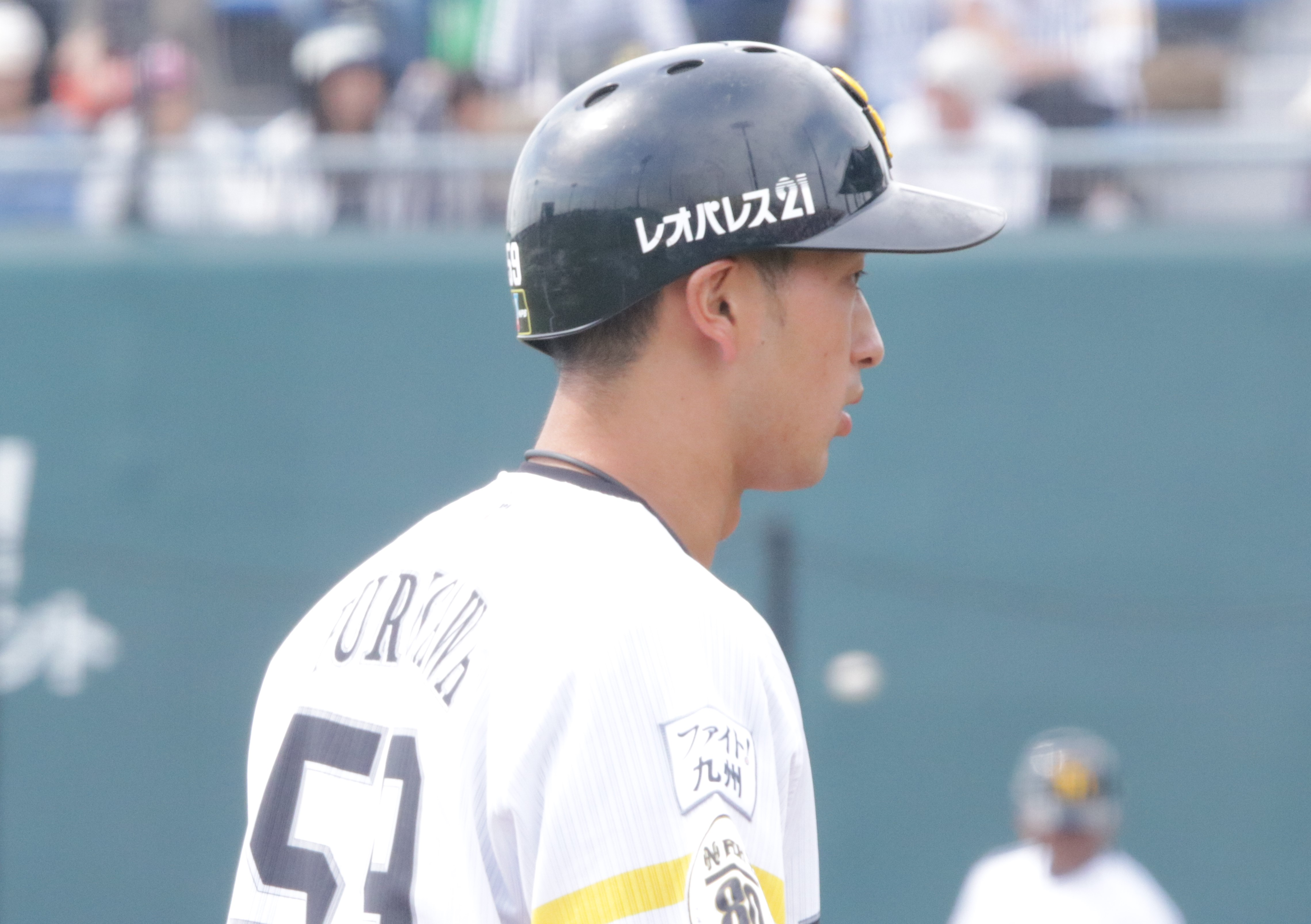 2018年5月5日 ウエスタンリーグ